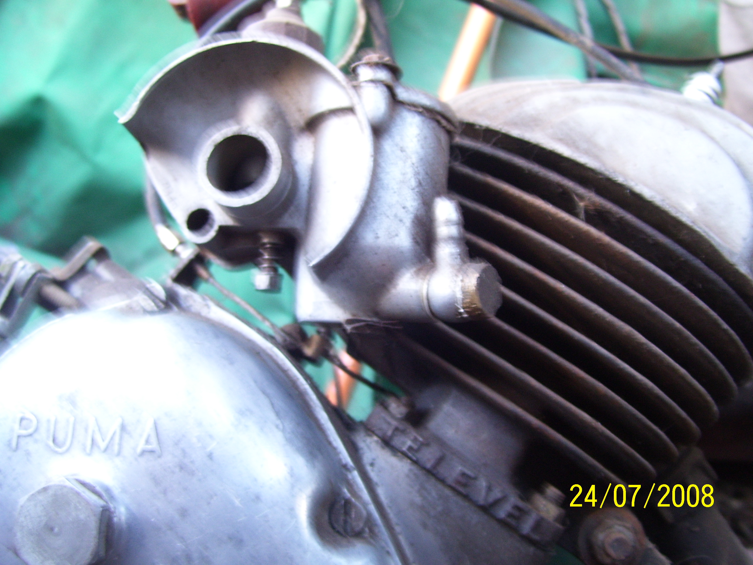 Base de cilindro carburador y toma de aire sin filtro